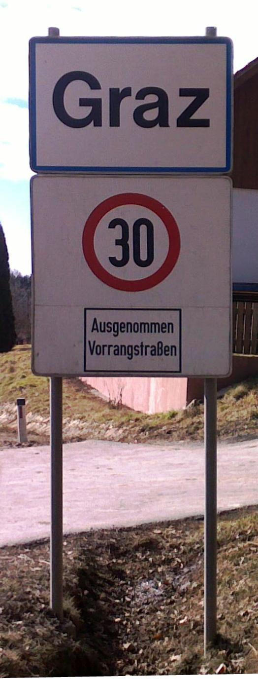 Ortsschild der Stadt Graz